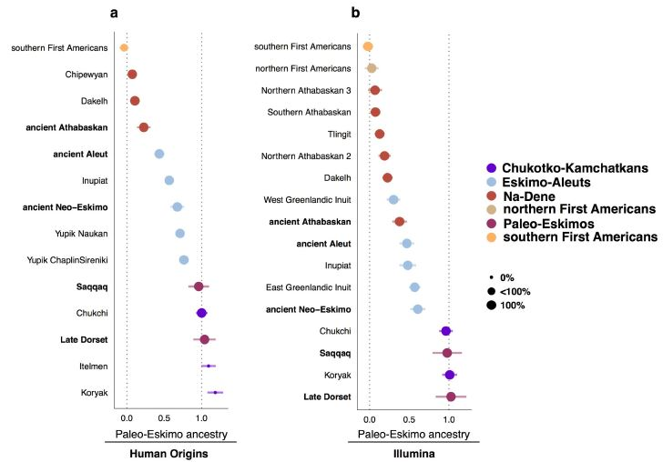 Arbre génomique des peuples palaéo-esquimaux et de l'extrême orient sibérien.